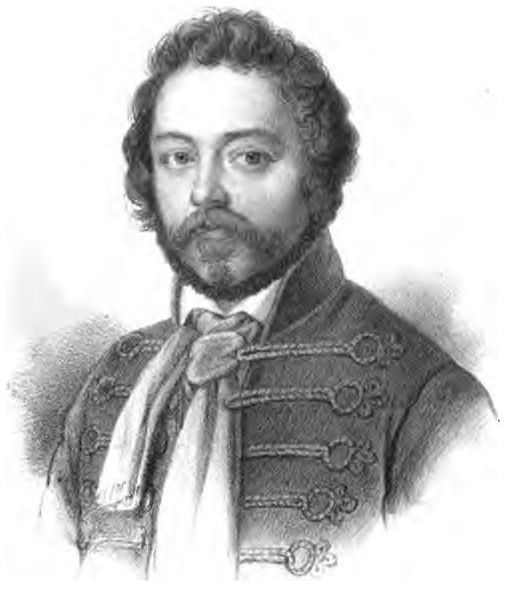 Ferdinand Freiligrath